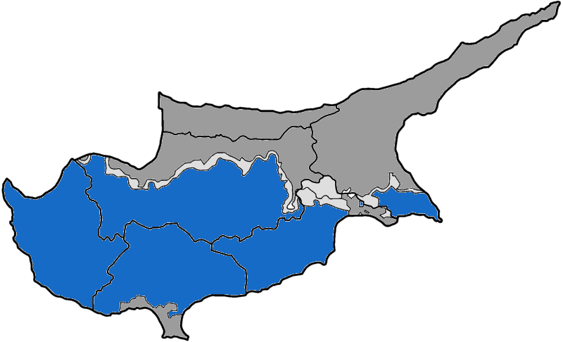 Αποτελέσματα ευρωεκλογών 2014 ανά επαρχία